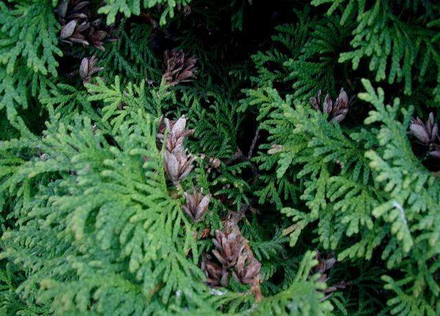 Thuja occidentalis